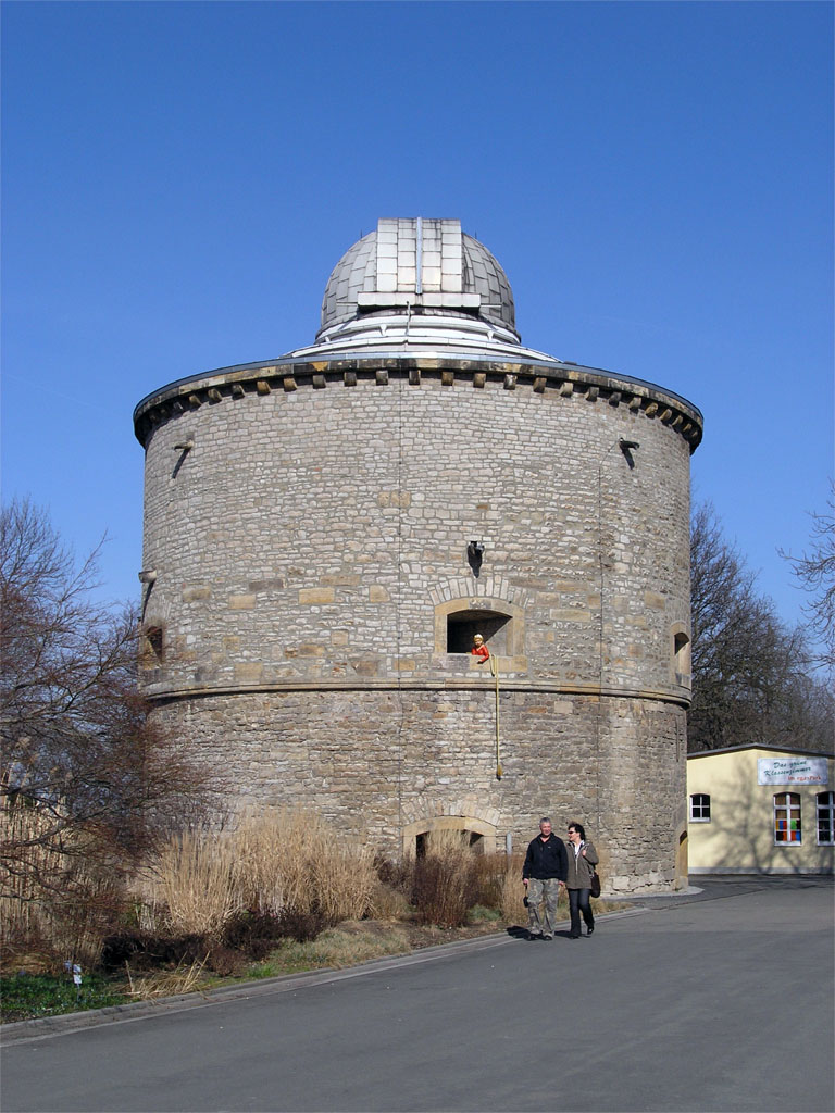 Turm B/Geschützturm I (errichtet 1528)